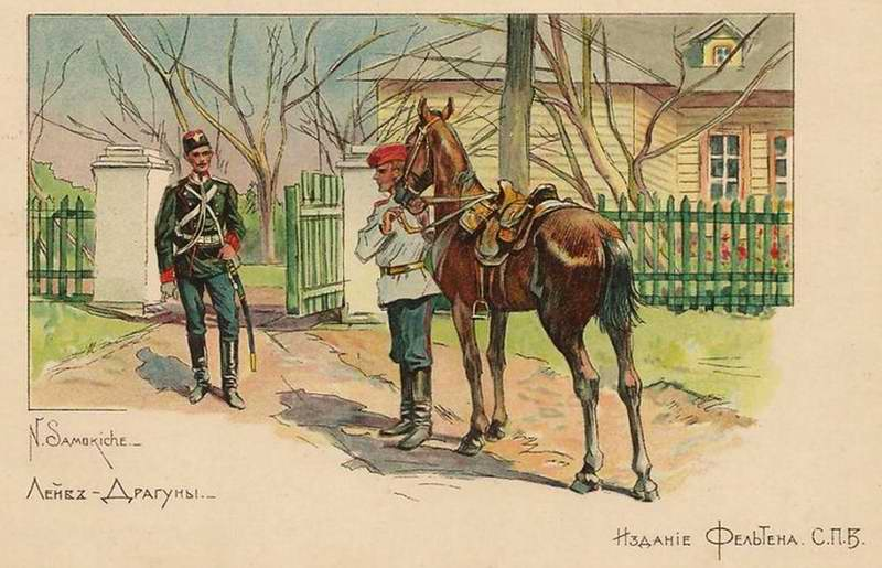 N. Samokiche. Лейб-Драгуны. Издание Фельтена. С.П.Б.